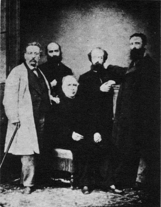 Fotografía en la que aparecen de pie y de izquierda a derecha Fernando Garrido, Elias Reclus, Jose Maria Orense (sentado), Aristides Rey y Giuseppe Fanelli. Tomada probablemente en Madrid, durante la visita de Giuseppe Fanelli a España.